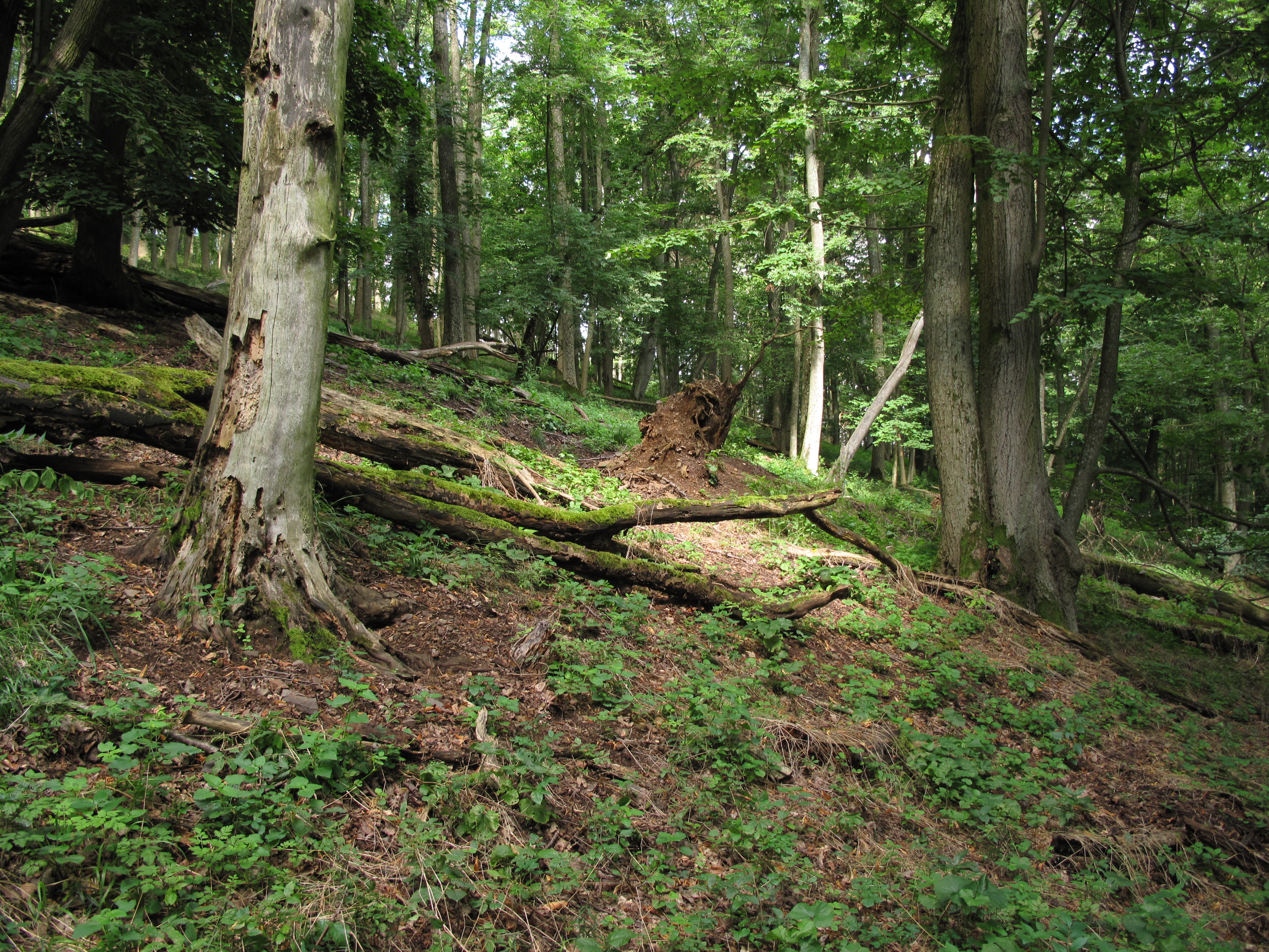 Přírodní rezervace Bělyšov, okres Klatovy, Česká republika.